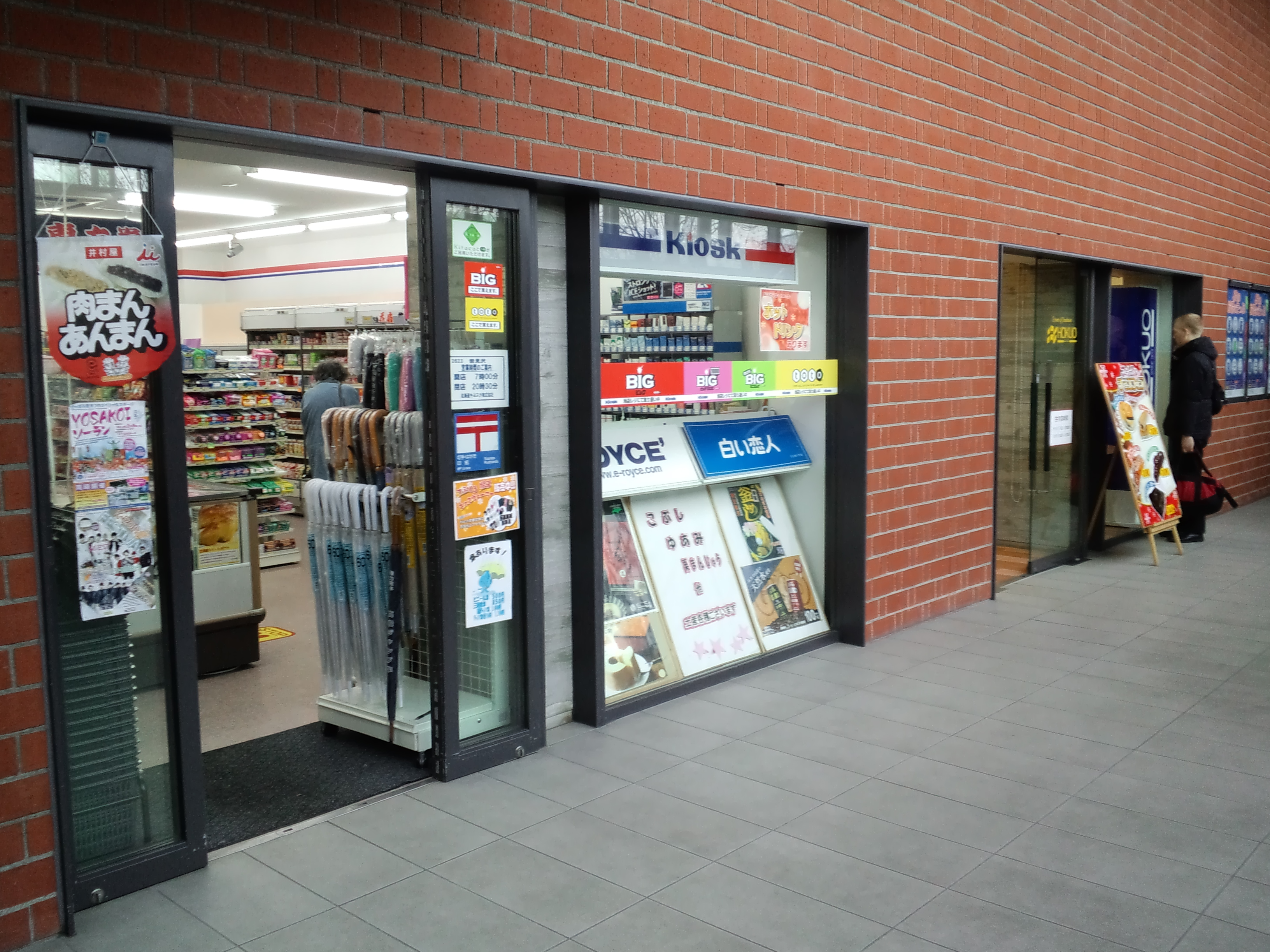 岩見沢複合駅舎・コンビニキヨスク（手前）と北欧（奥、ベーカリー）